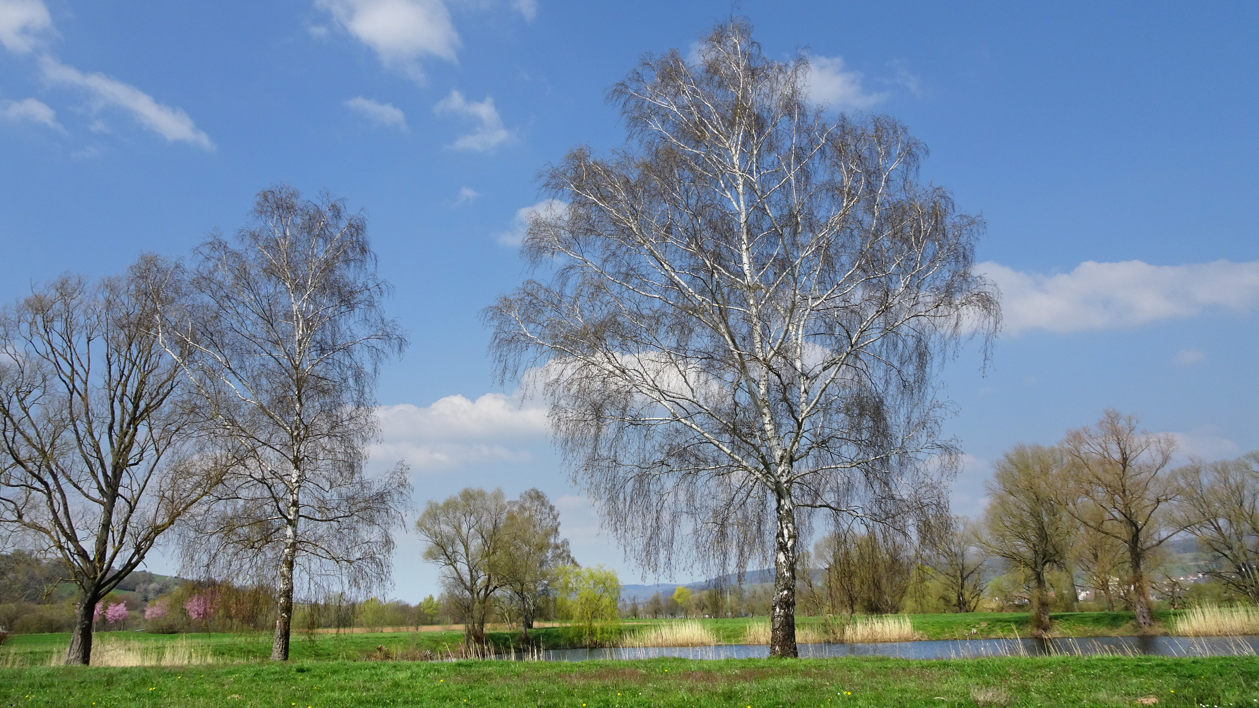 Das im Jahr 1993 ausgewiesene Landschaftsschutzgebiet „Auenverbund Fulda“ umfasst Flächen entlang der Fulda aus mehreren Landkreisen. Schutzziel ist die Erhaltung der durch unterschiedliche Durchfeuchtungsstufen geprägten Ufervegetationstypen sowie die Wiederherstellung naturnaher Gewässerabschnitte durch die Umwandlung von Ackerland in extensiv genutztes Grünland.